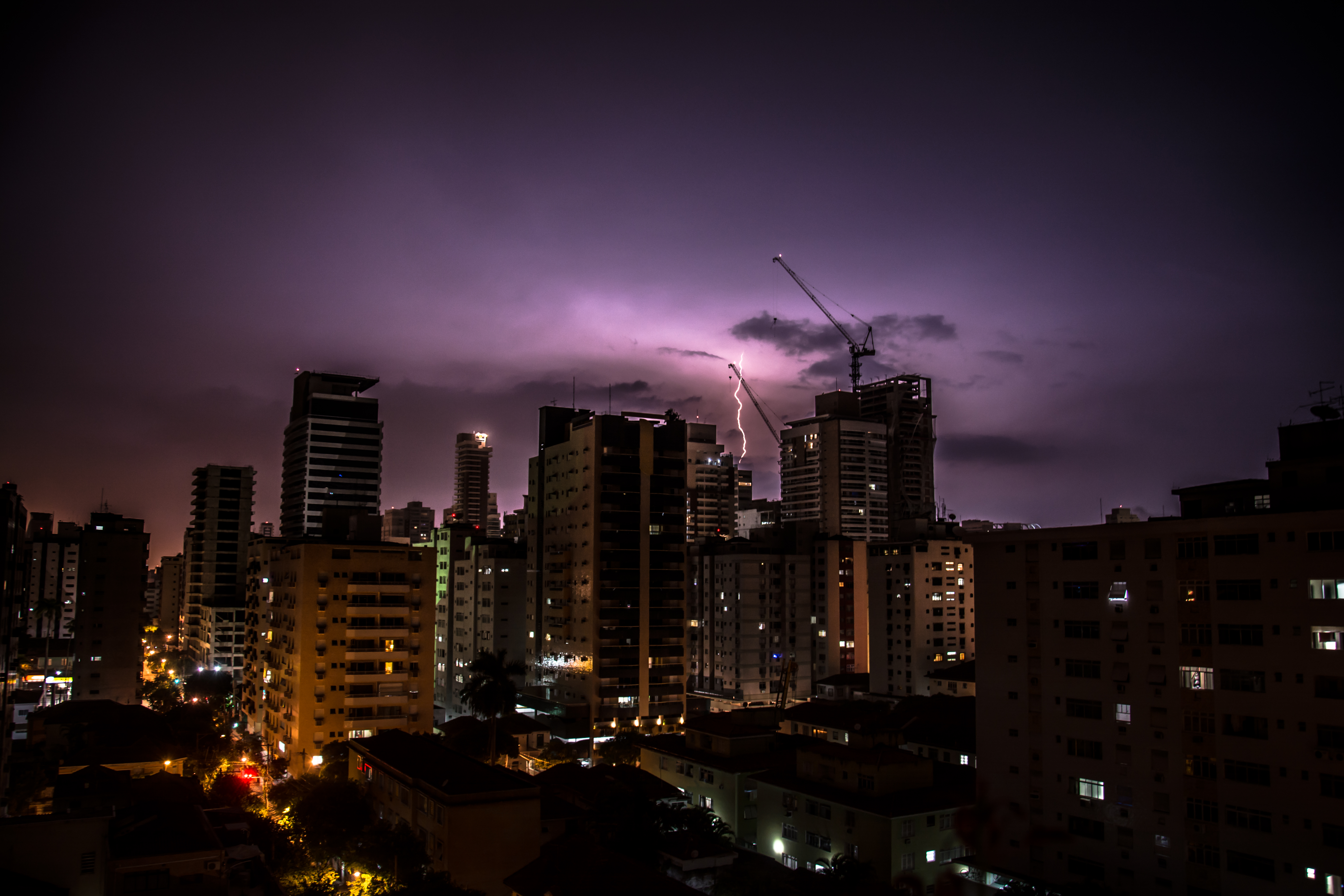 Tempestade de raio em santos